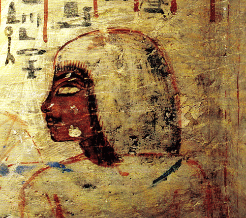 'Aper-El.